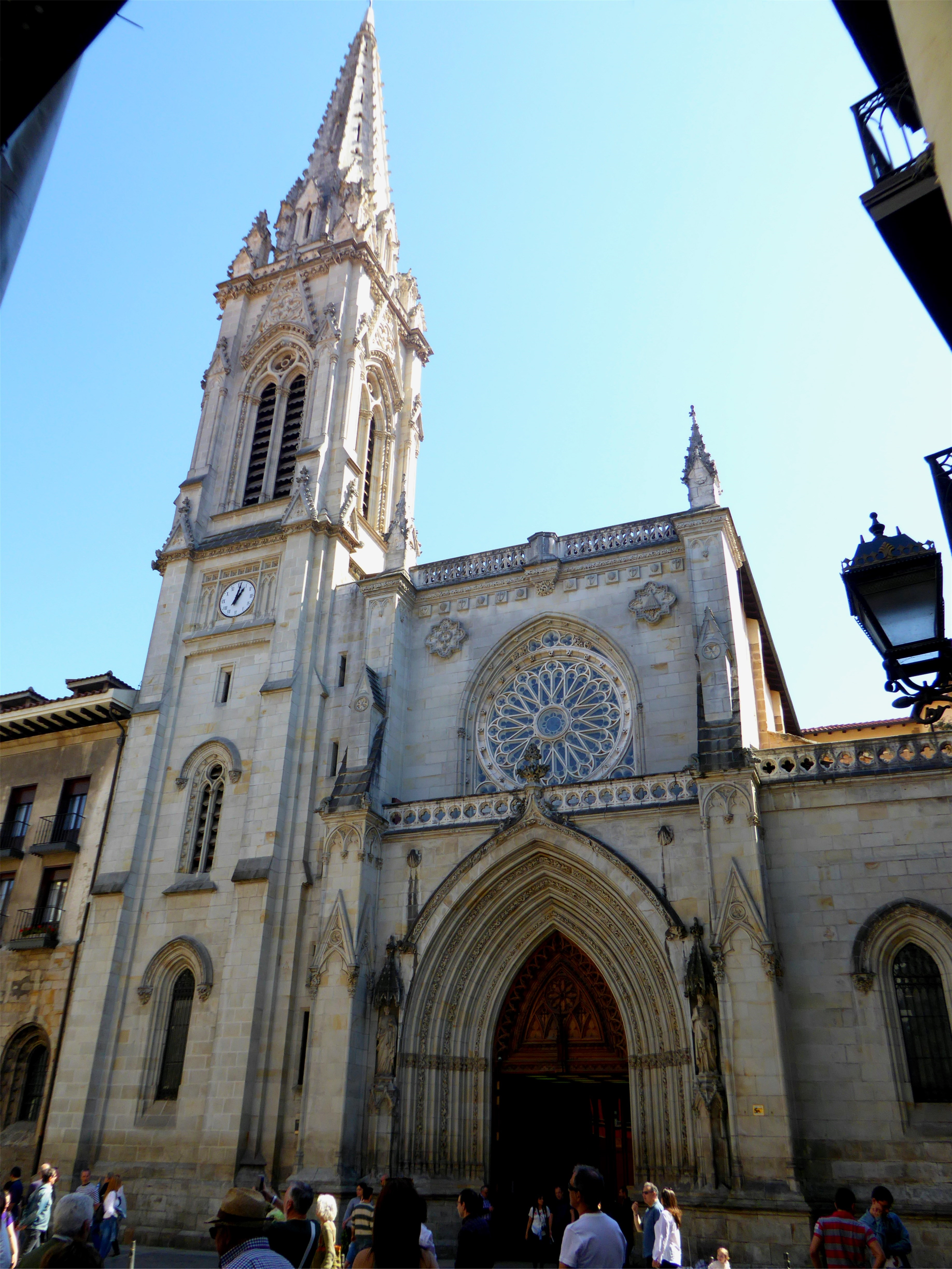 Cathédral Santiago, Bilbao, Espagne.